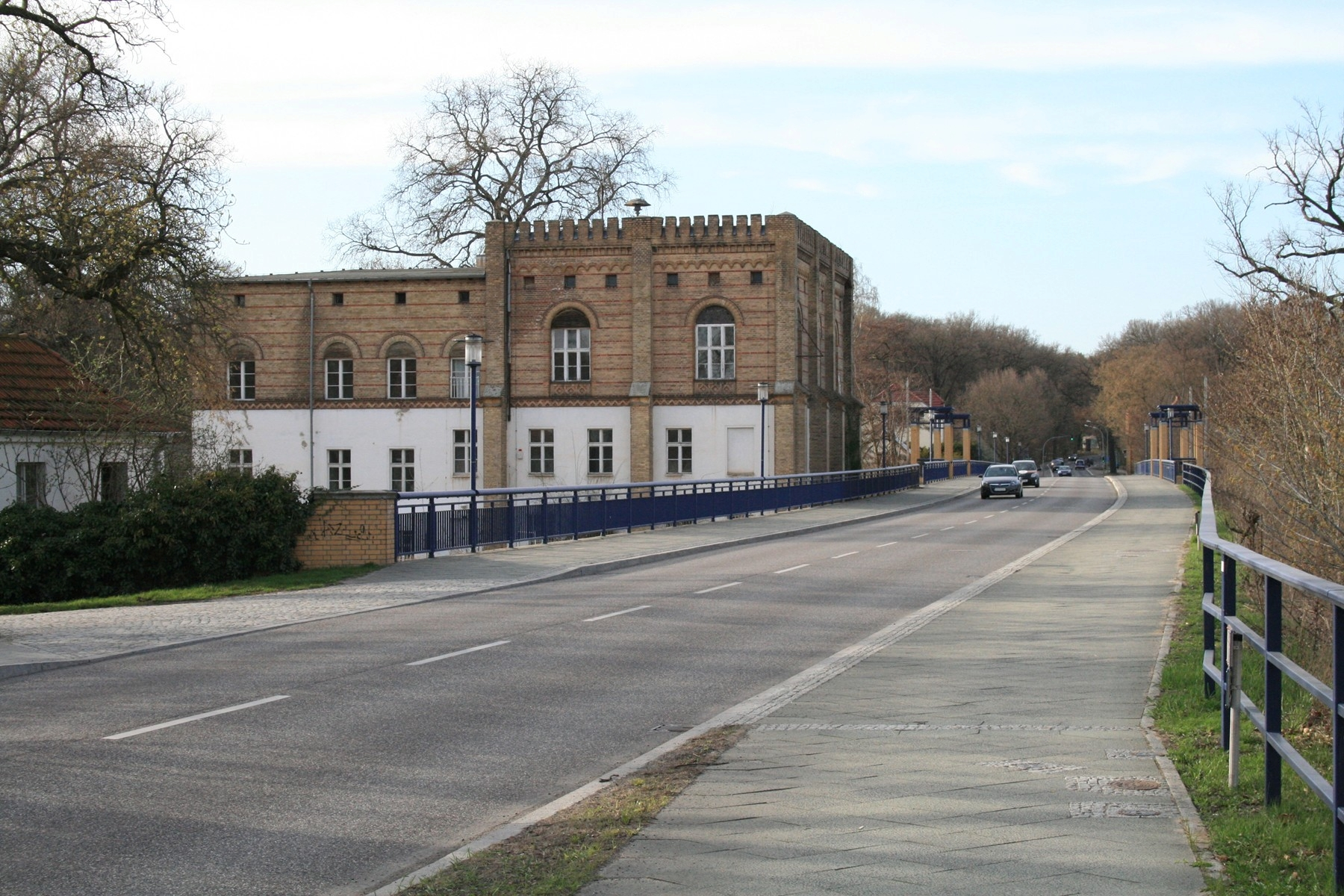 Land Brandenburg; Landkreis Potsdam. Neu Fahrland, Tschudistraße 1. Baudenkmal: Fährhaus